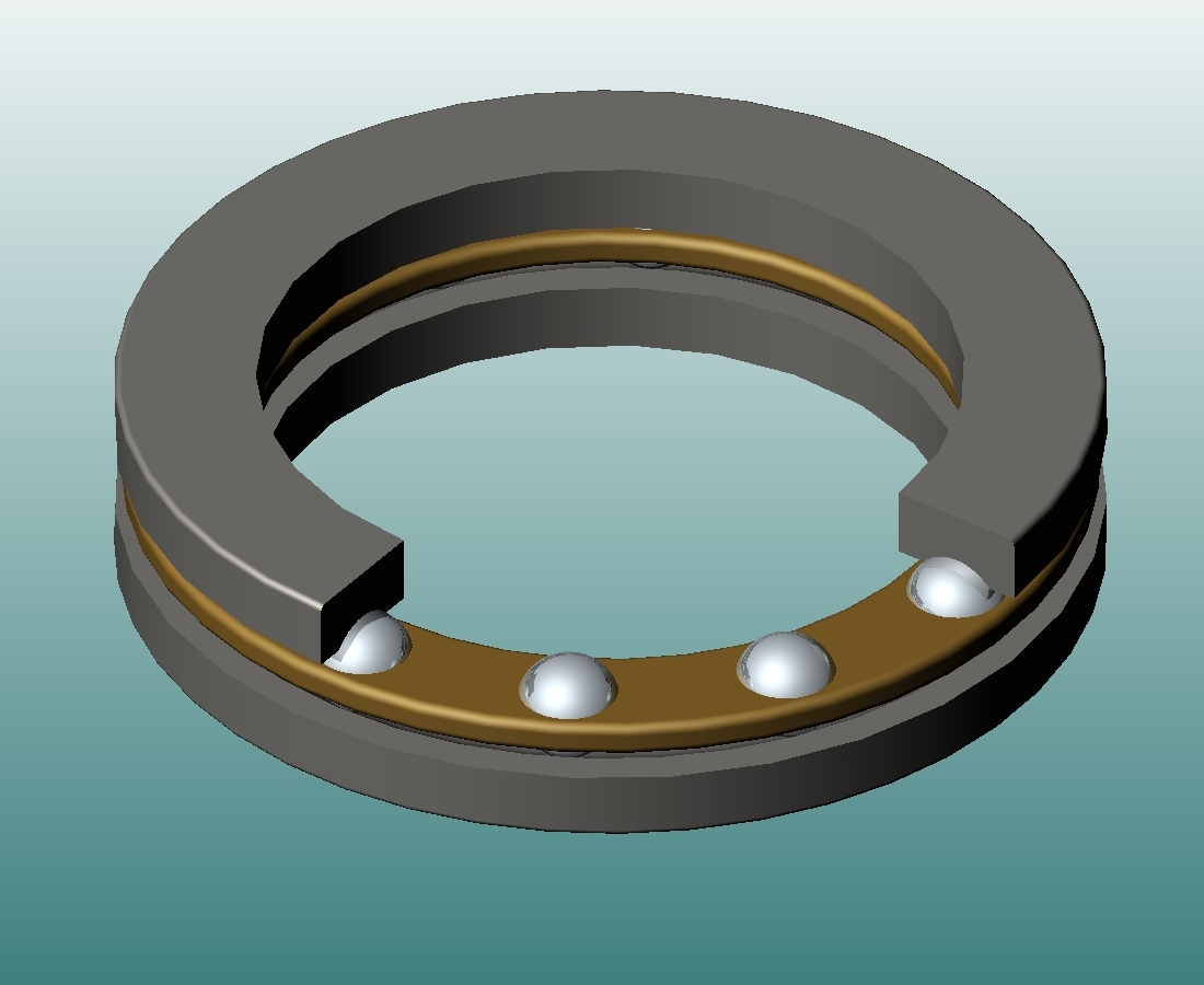 Ecorché d'une butée à billes. Image de synthèse réalisée sous Solidworks